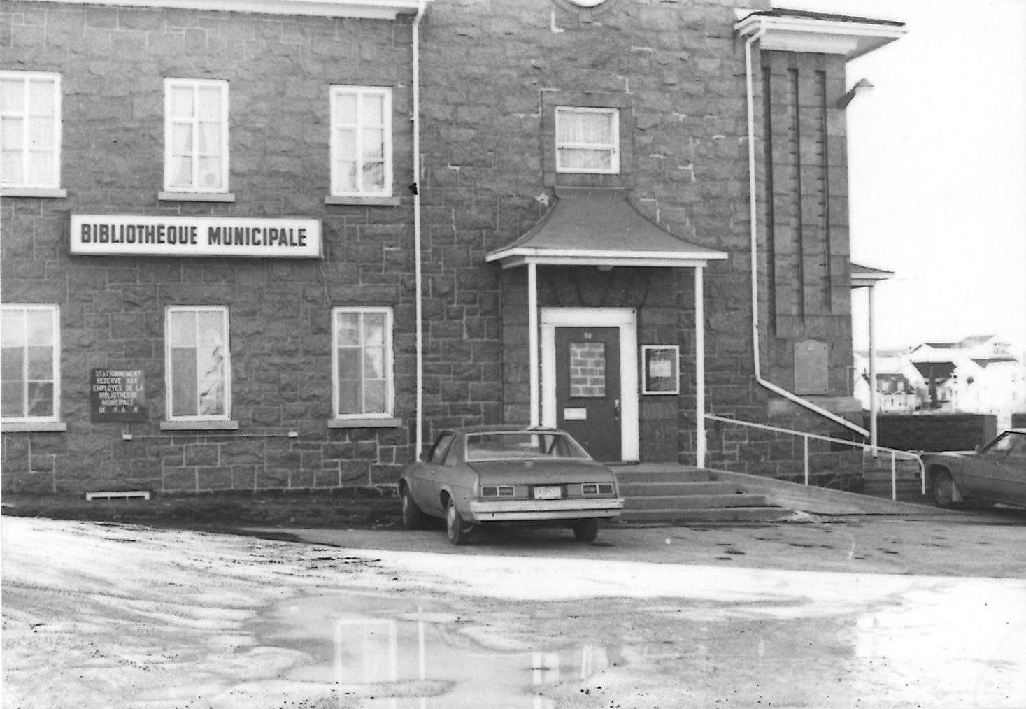 La Bibliothèque municipale d'Alma en 1980, alors qu'elle était située au 50, rue St-Joseph à Alma.